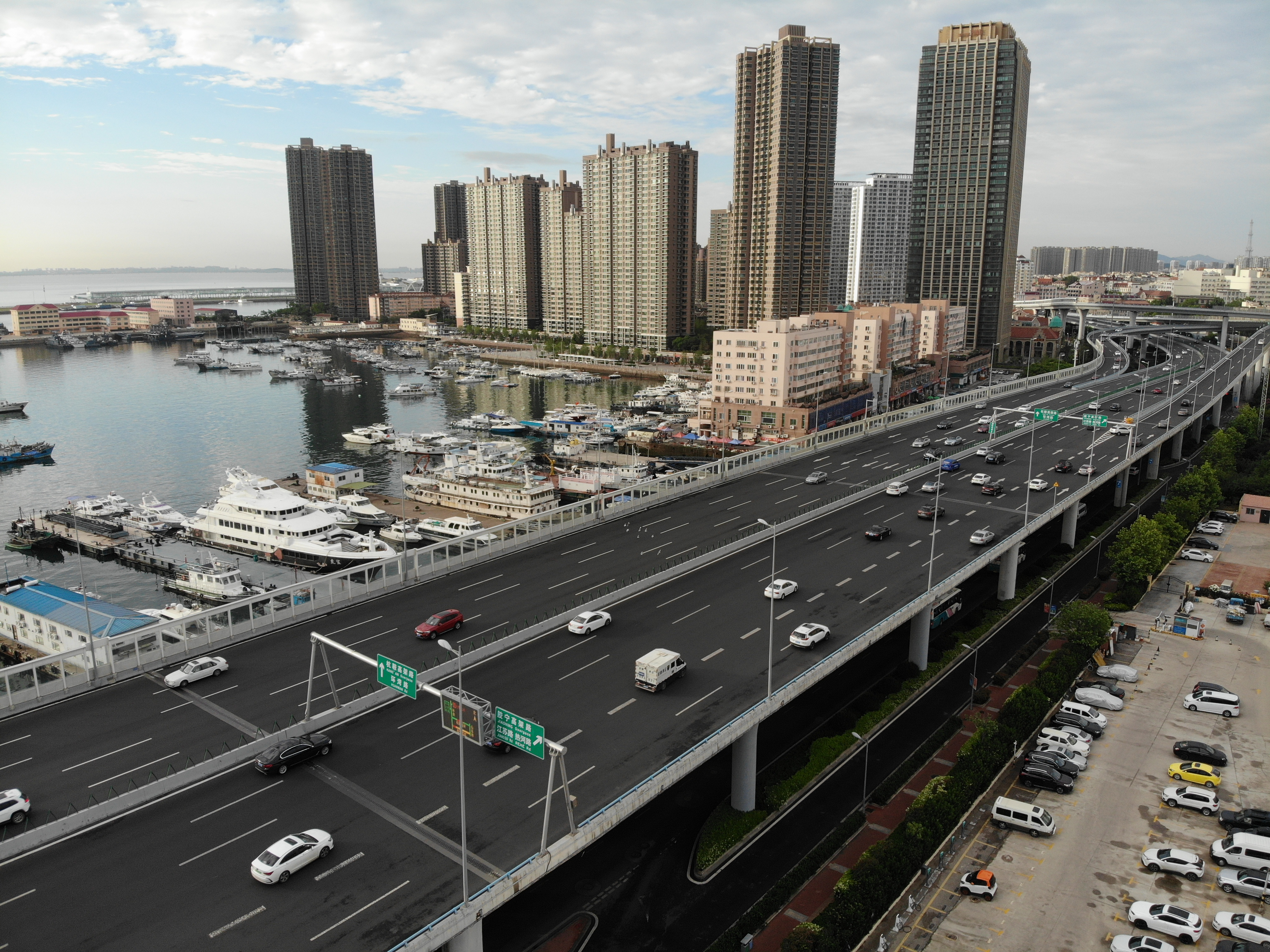 新冠高架路小港段